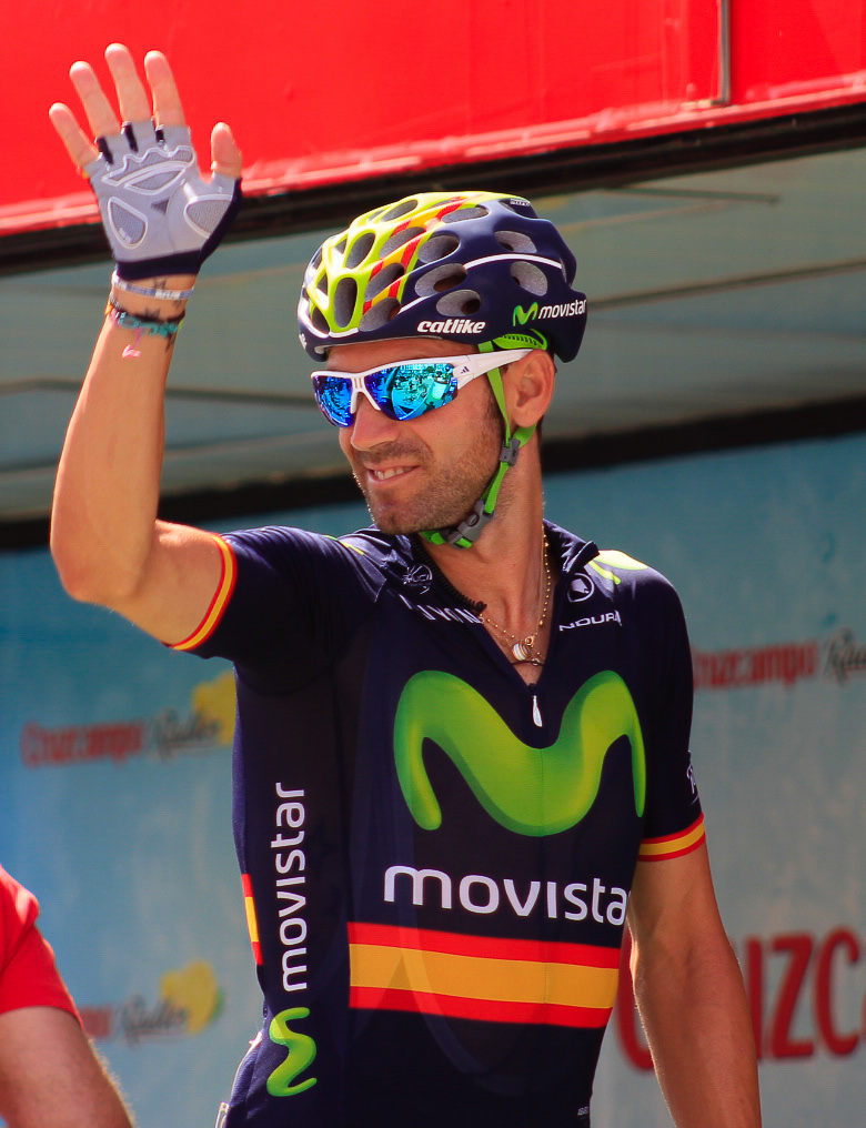 Vuelta a España 2015 | 8ª Etapa Puebla de Don Fadrique - Murcia-25